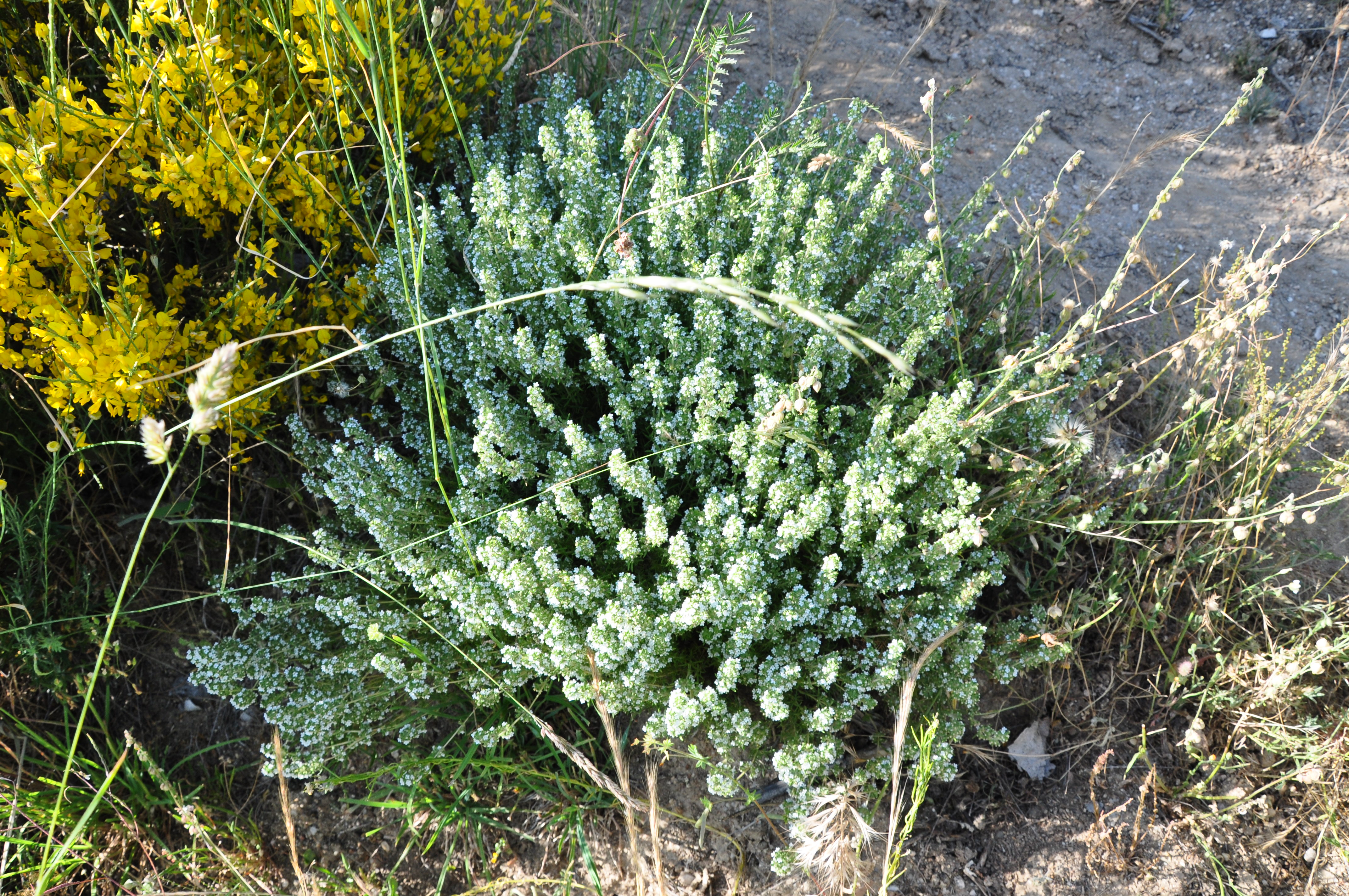 Tomillo salsero en la Sierra de Ávila, España